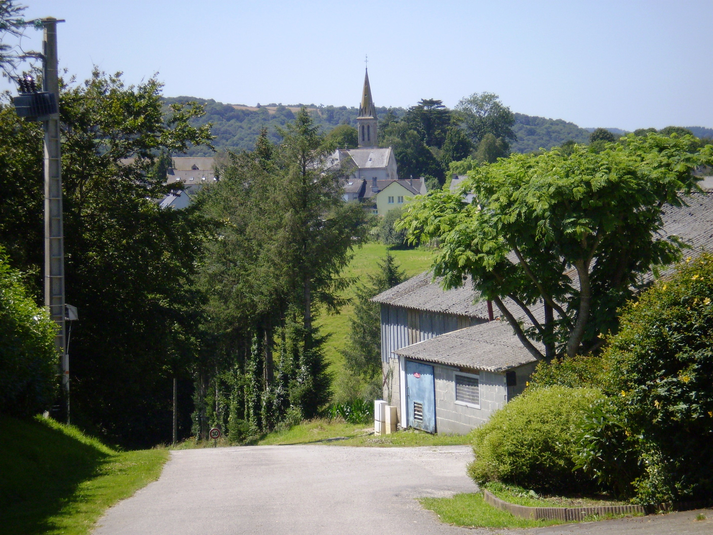 Lothey (vue générale du bourg de Landremel)